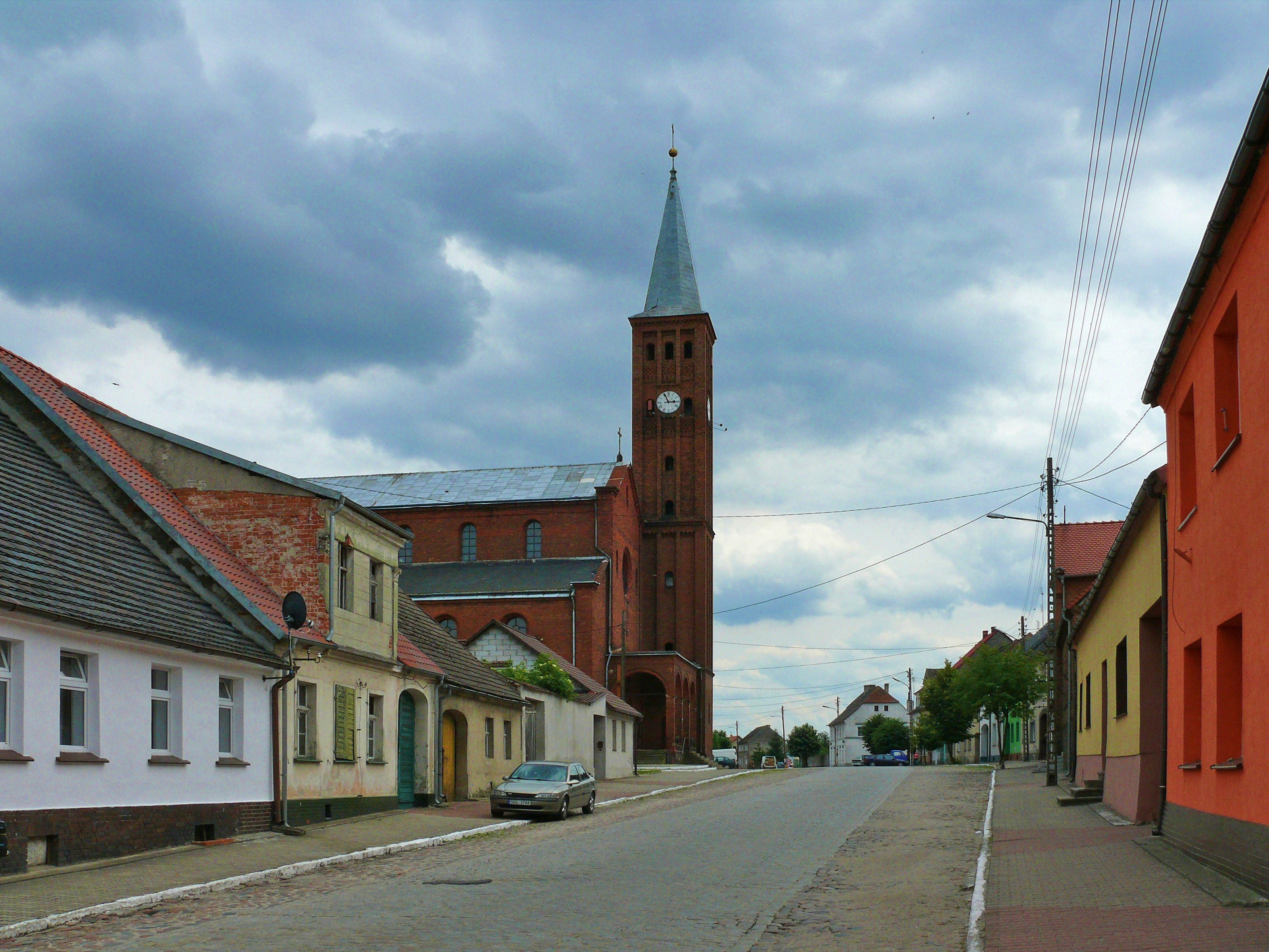 Bobrowice-centrum